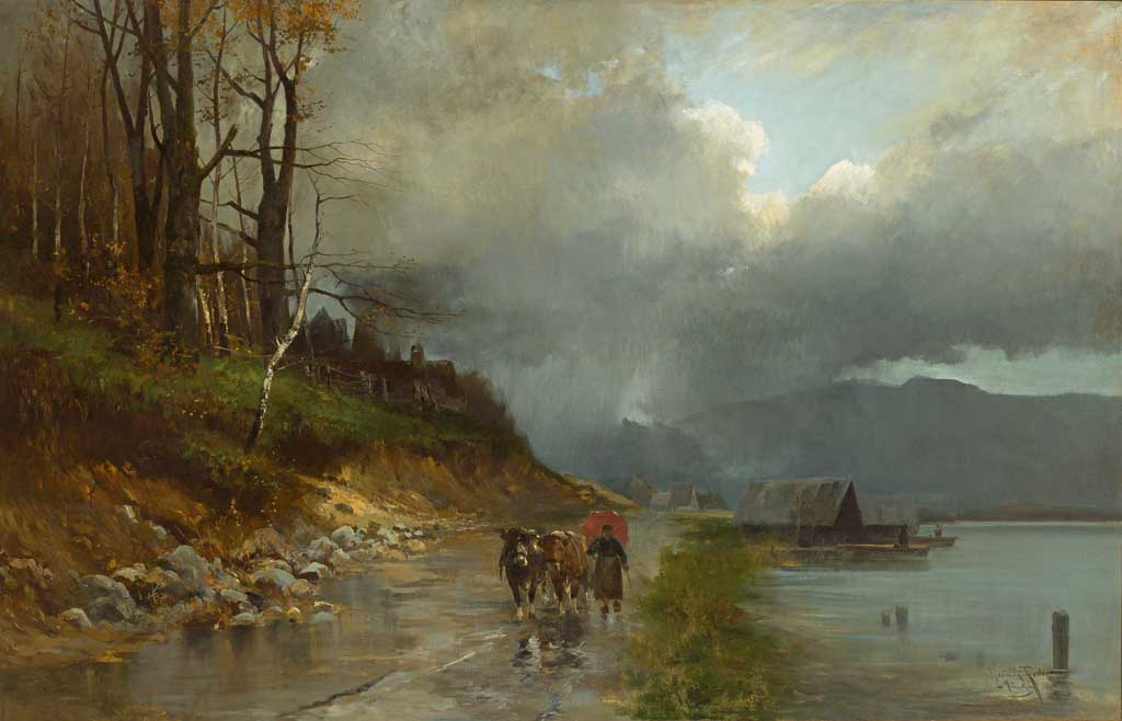 Bäuerin mit zwei Ochsen auf dem Weg am Ufer eines Sees. Öl/Lwd. 93 x 143 cm. Signiert. Ortsbezeichnung: München.